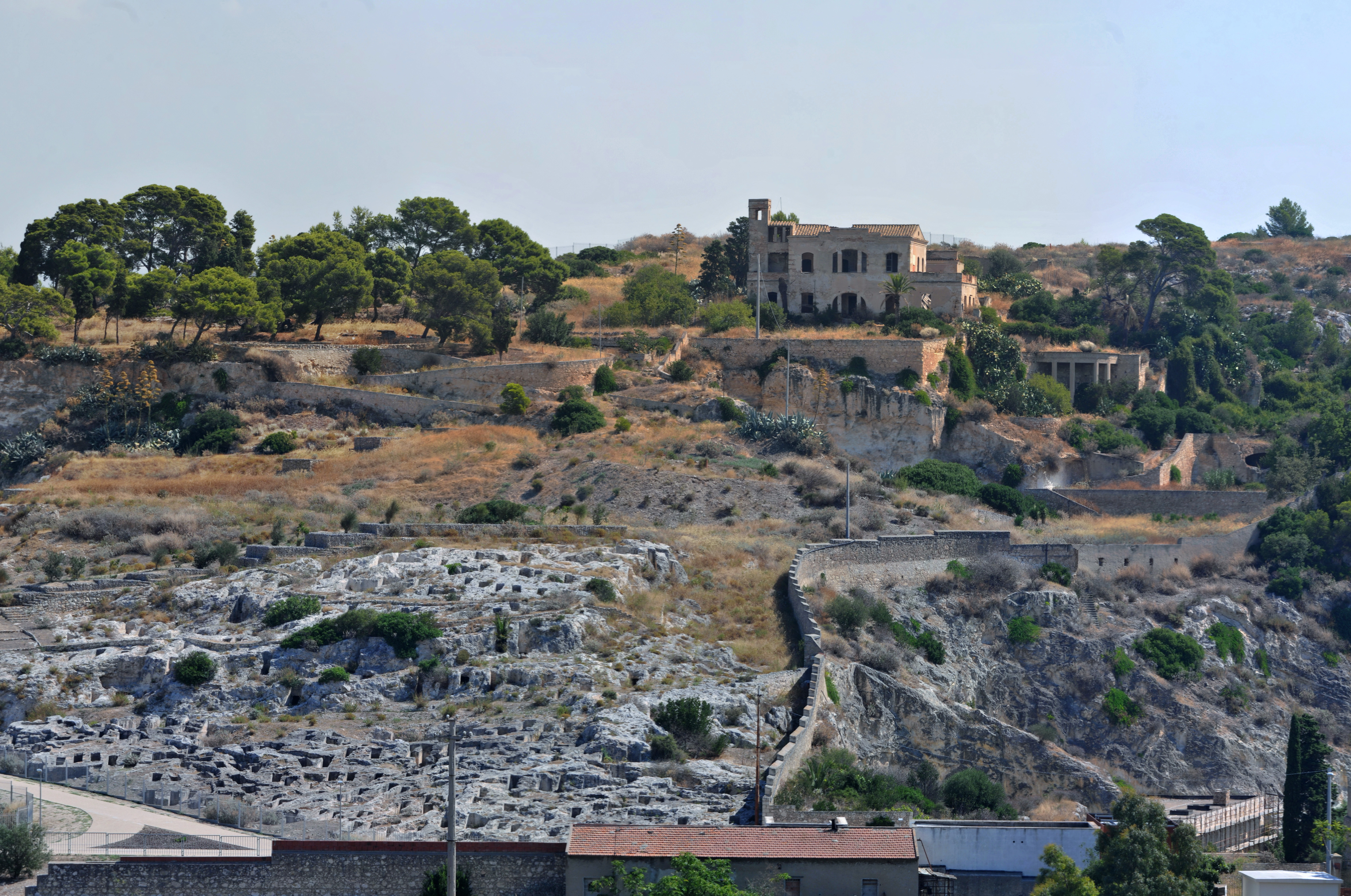 Necropoli di Tuvixeddu This is a photo of a monument which is part of cultural heritage of Italy.